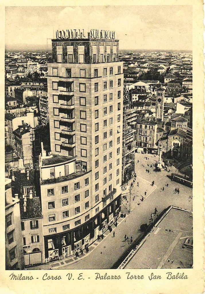 Milano, la Torre Snia Viscosa o Torre San Babila, inuna fotografia precedente al 1943